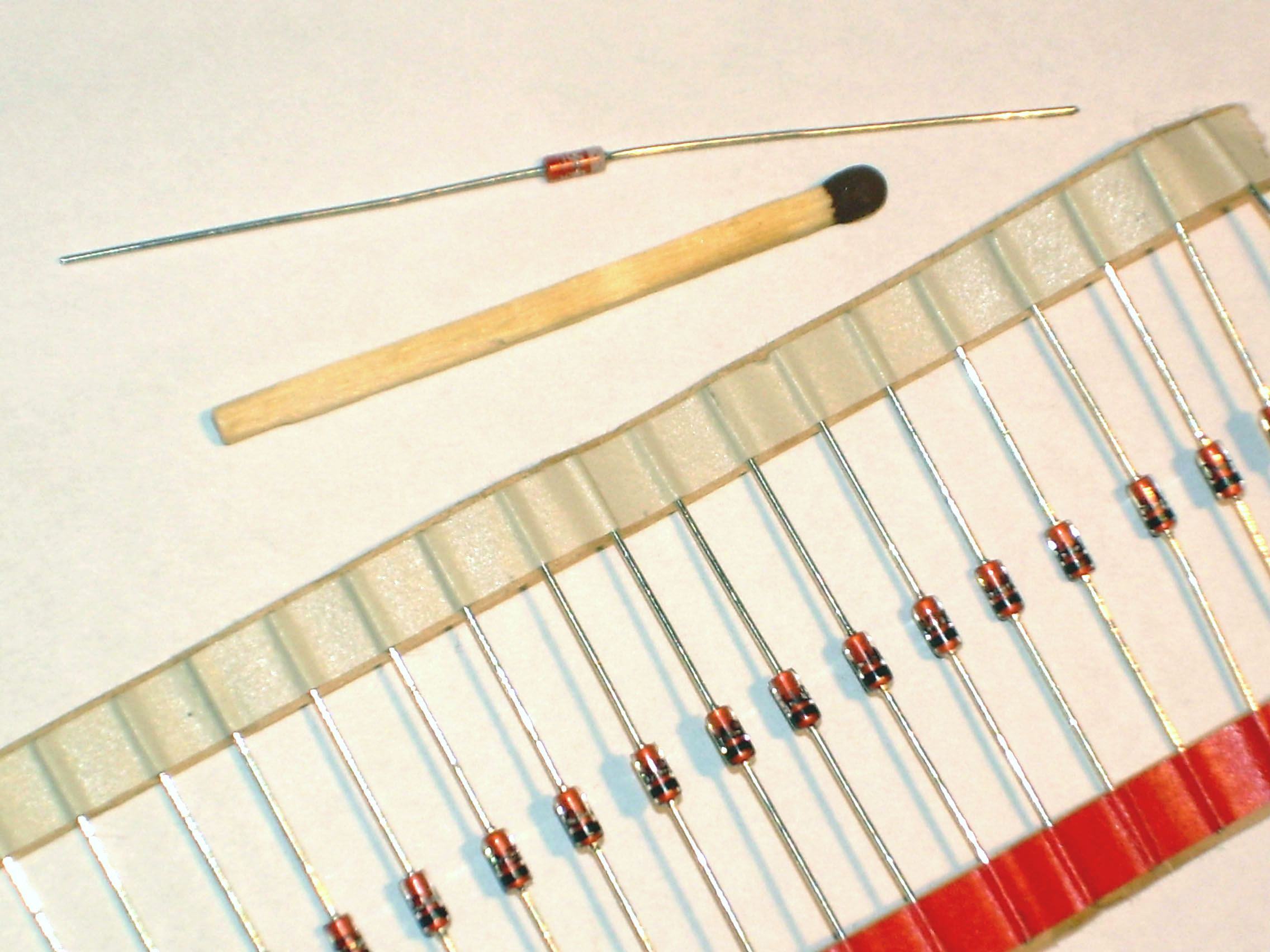 Zener diodes